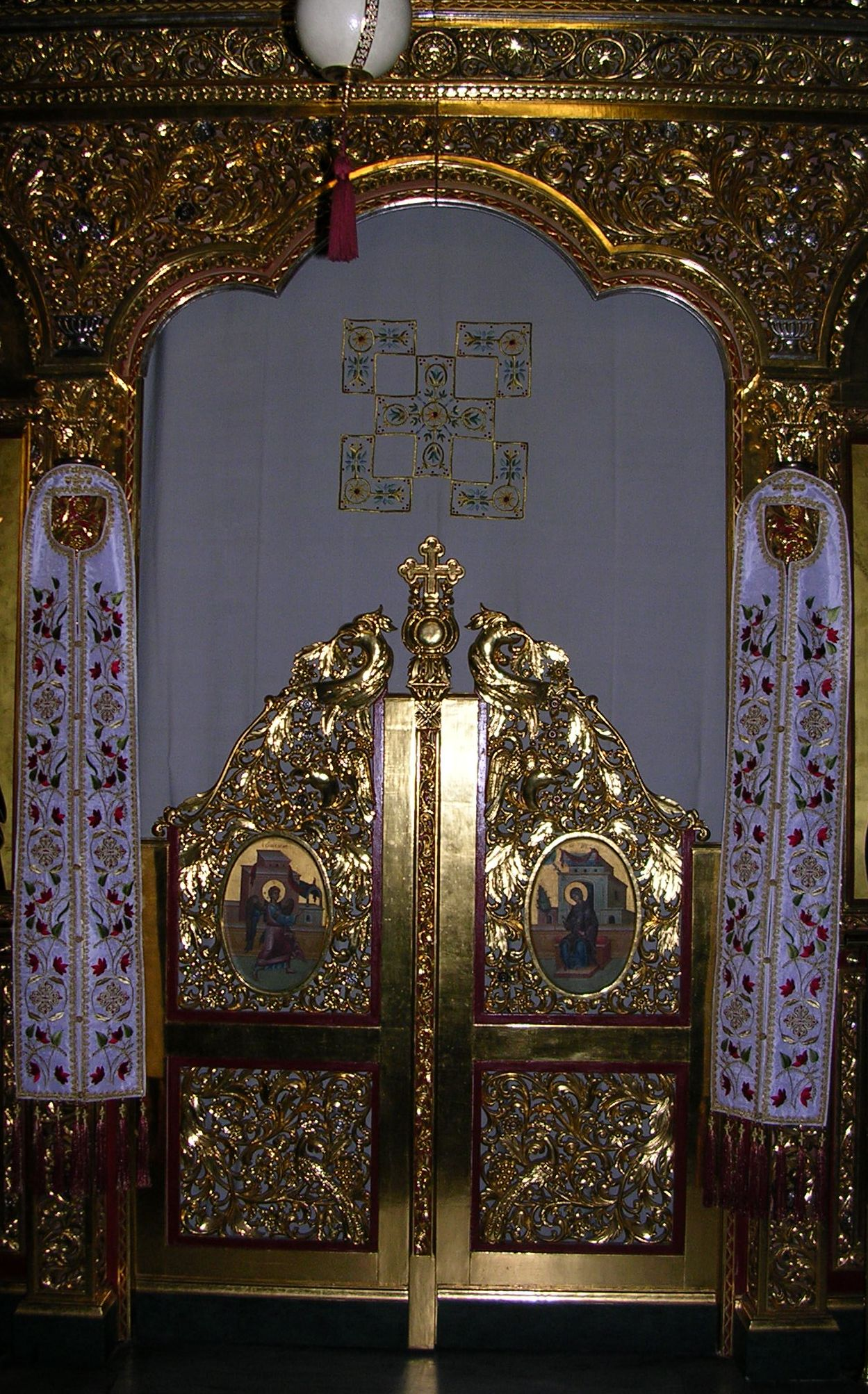 Gold Holy Doors from st. Theodora monastery (Thesaloniki) / Золотые царские врата, монастырь Феодоры Солунской (Греция, Салоники)